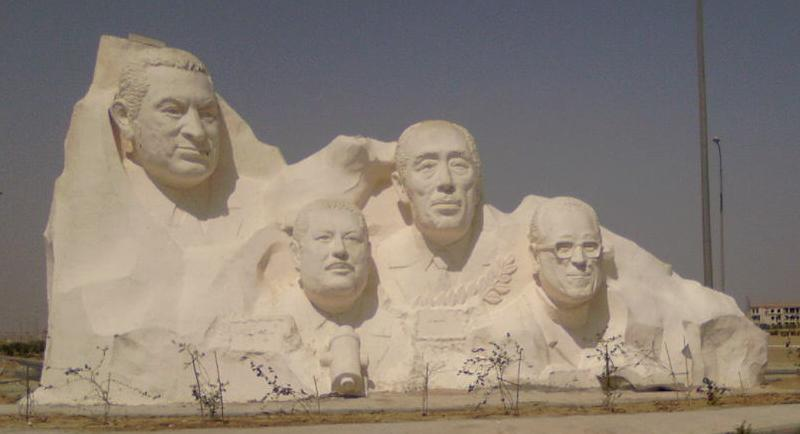 نصب تذكاري لشخصيات مصرية شهيرة، من اليمين لليسار: نجيب محفوظ (كاتب) - محمد أنور السادات (رئيس مصر السابق)- أحمد زويل (عالم) - محمد حسني مبارك